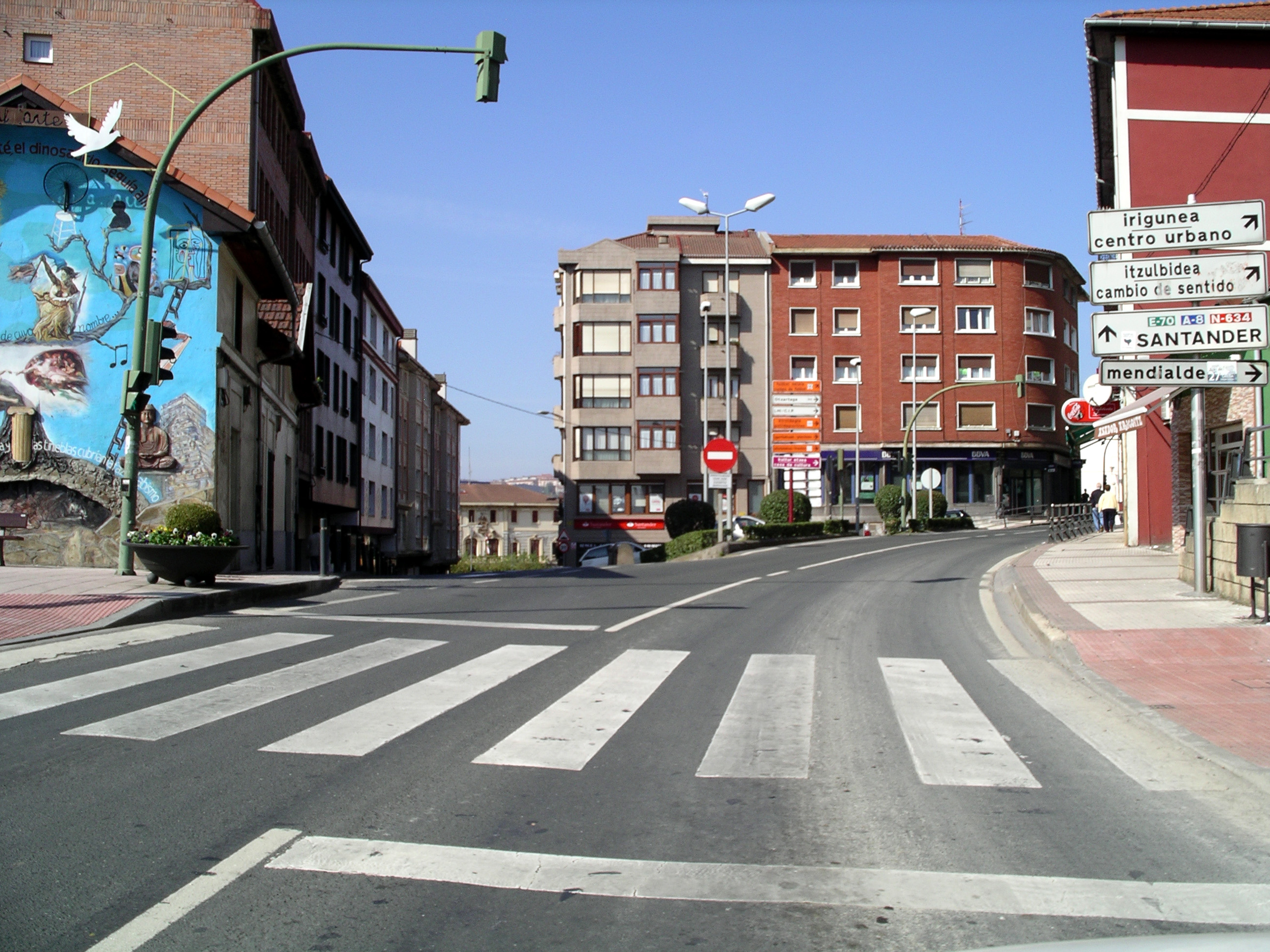 Ortuellako erdigunea, Meatzaldea, Bizkaia.